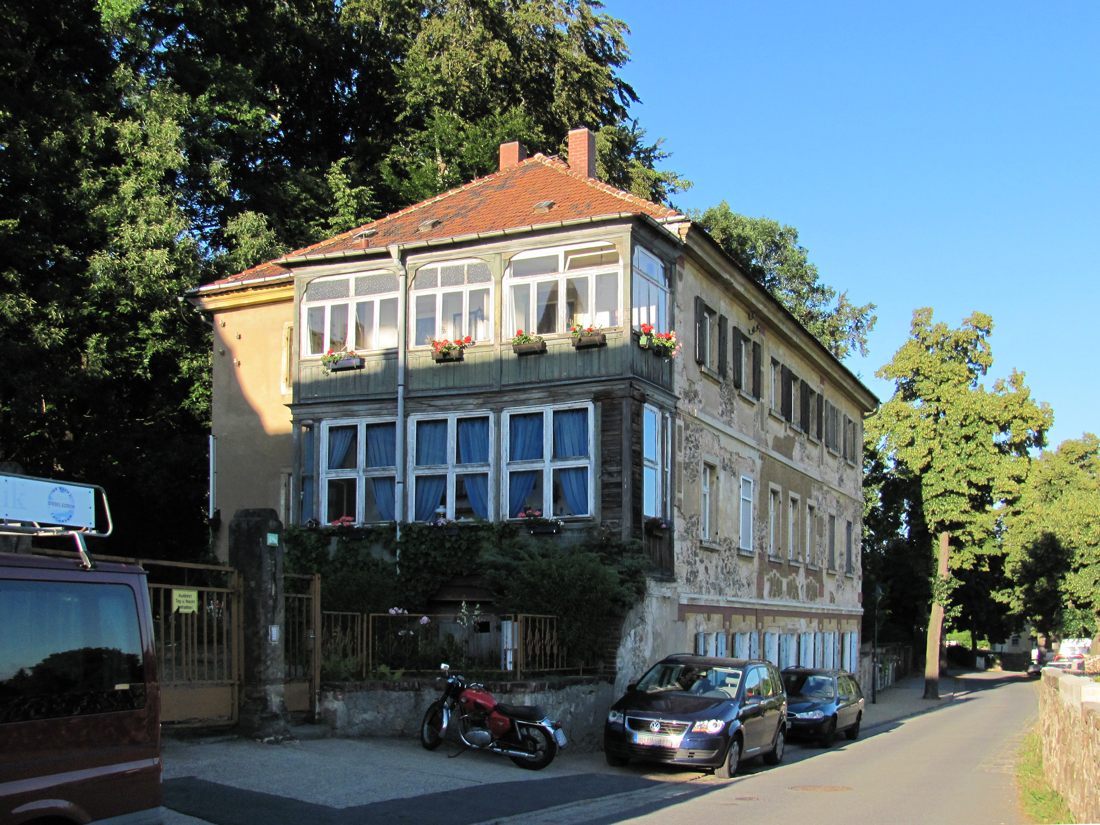 Radebeul, Weingut Hofmannsberg, Herrenhaus